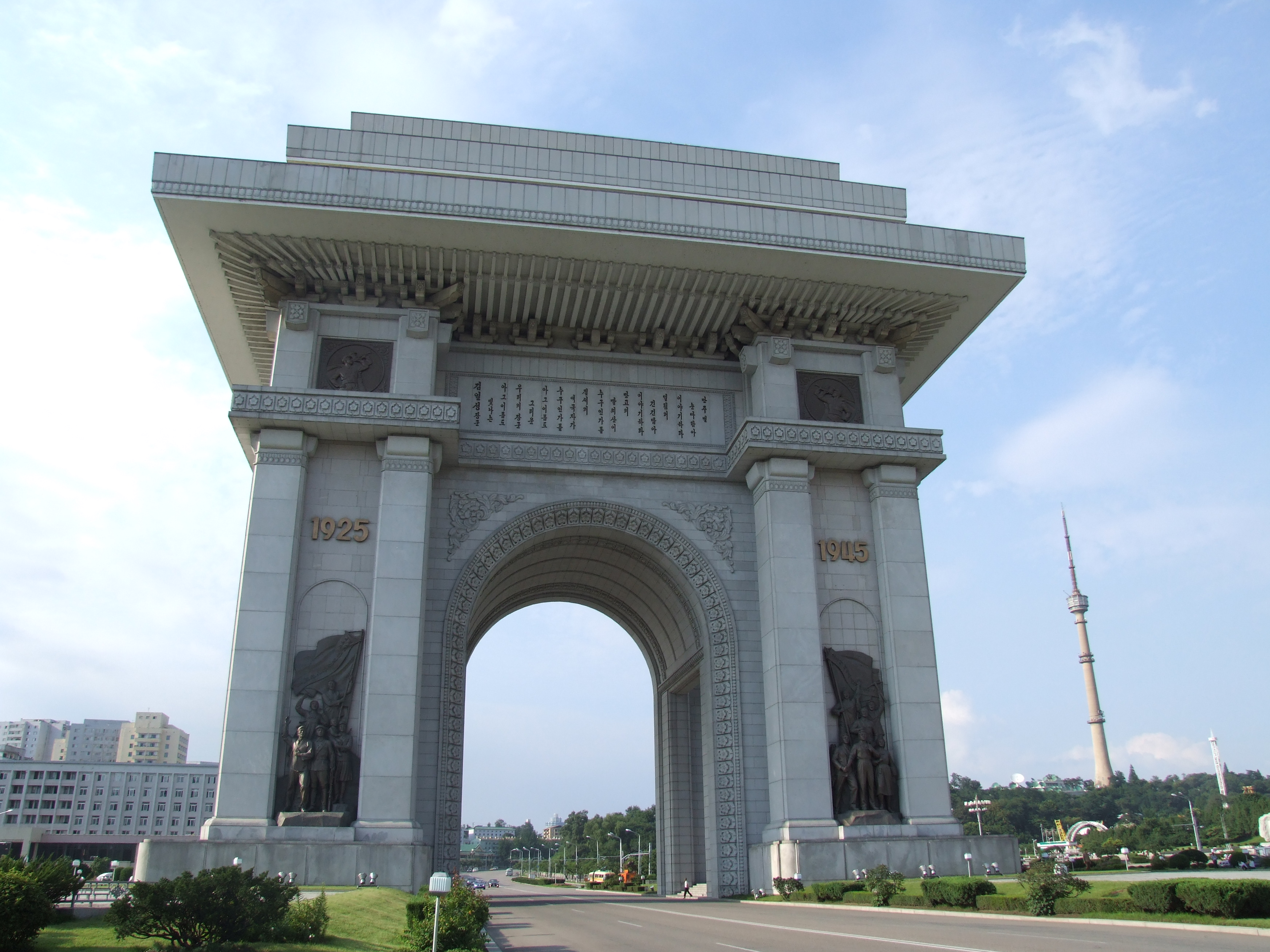 Triumphbogen in Pjöngjang